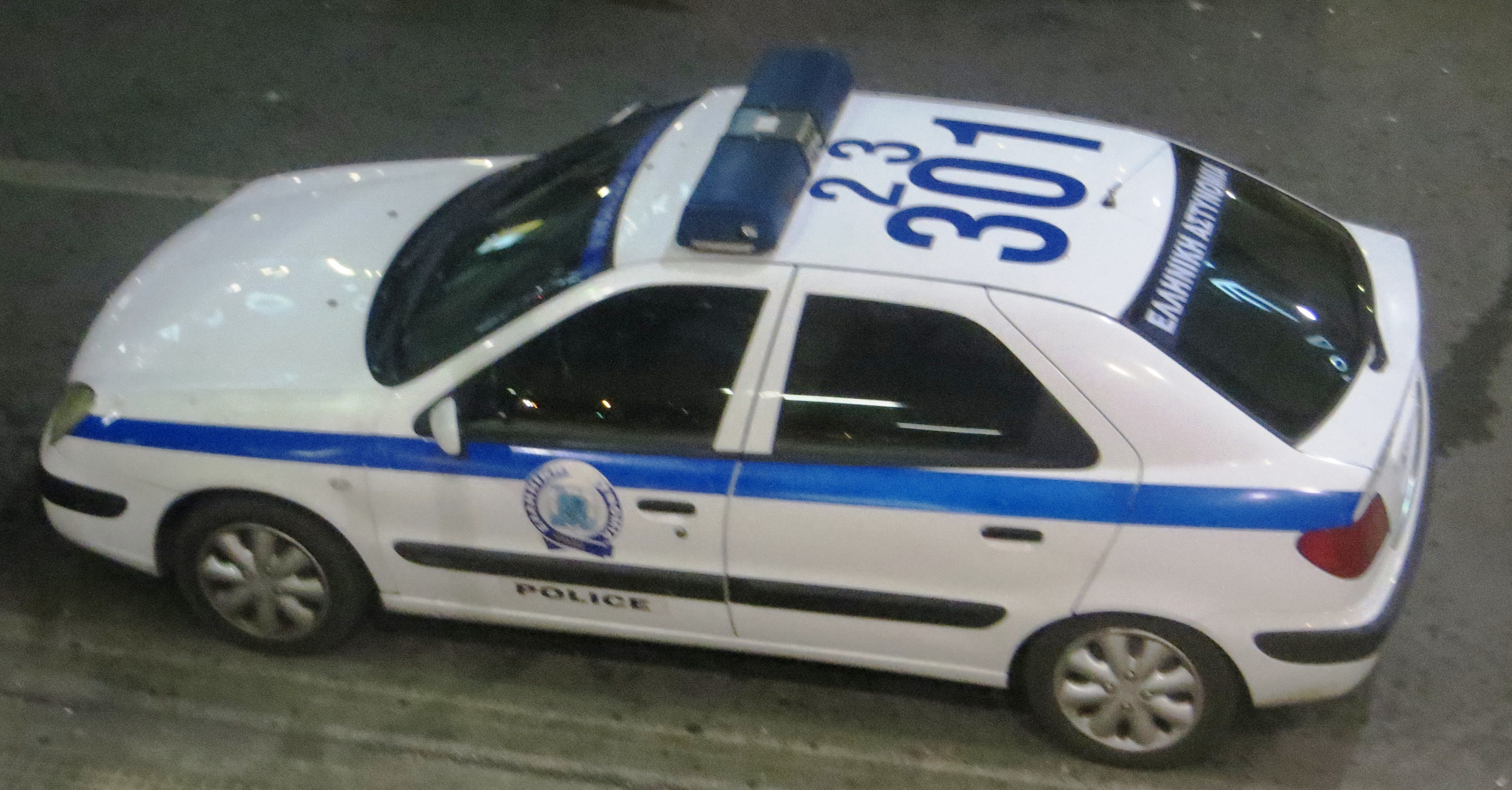 Griekse politieauto